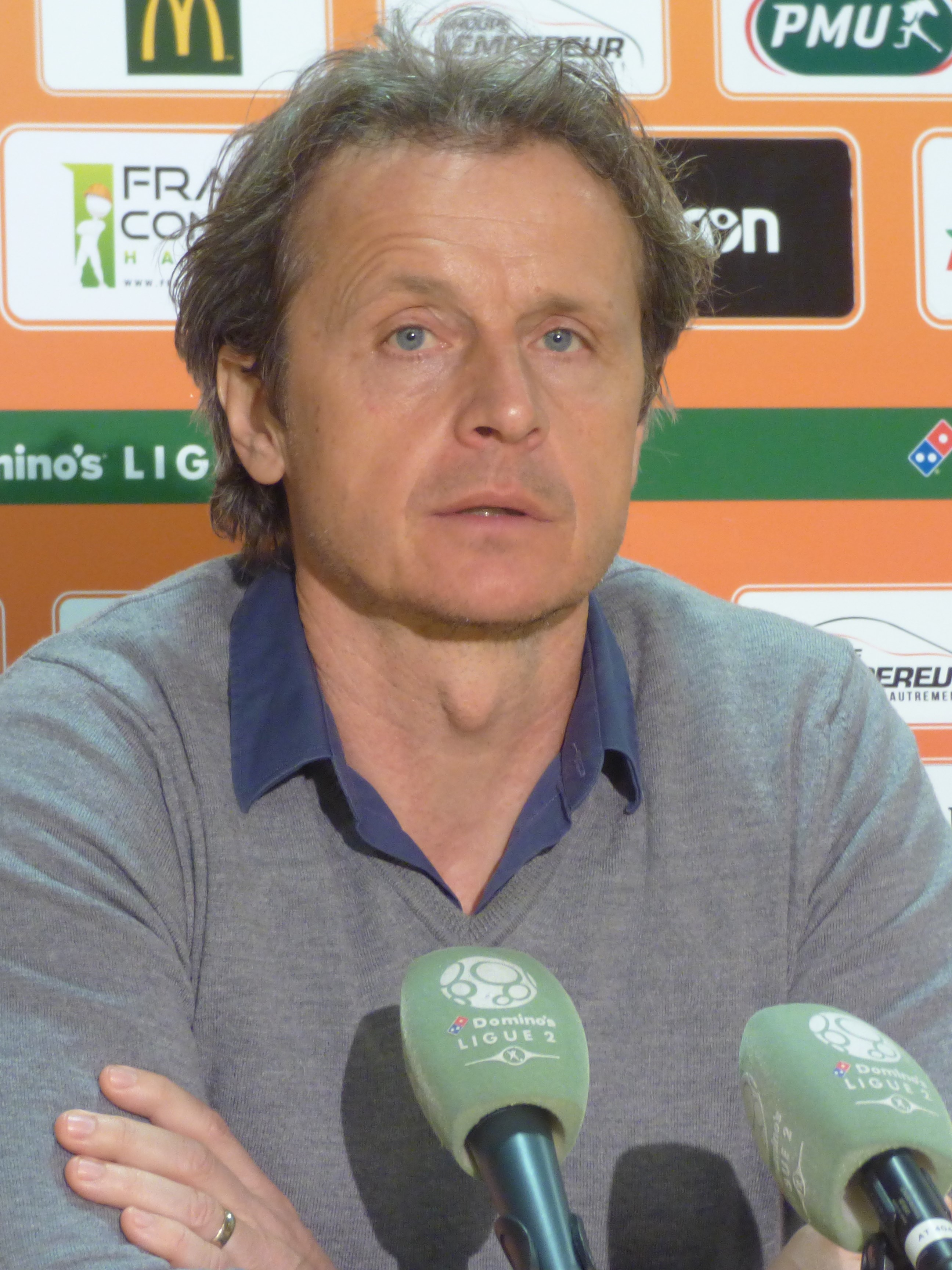 Réginald Ray après le match Lens-Valenciennes, comptant pour la 32ème journée du championnat de France de football de Ligue 2 2018-2019, le 12 avril 2019, au Stade Bollaert-Delelis.